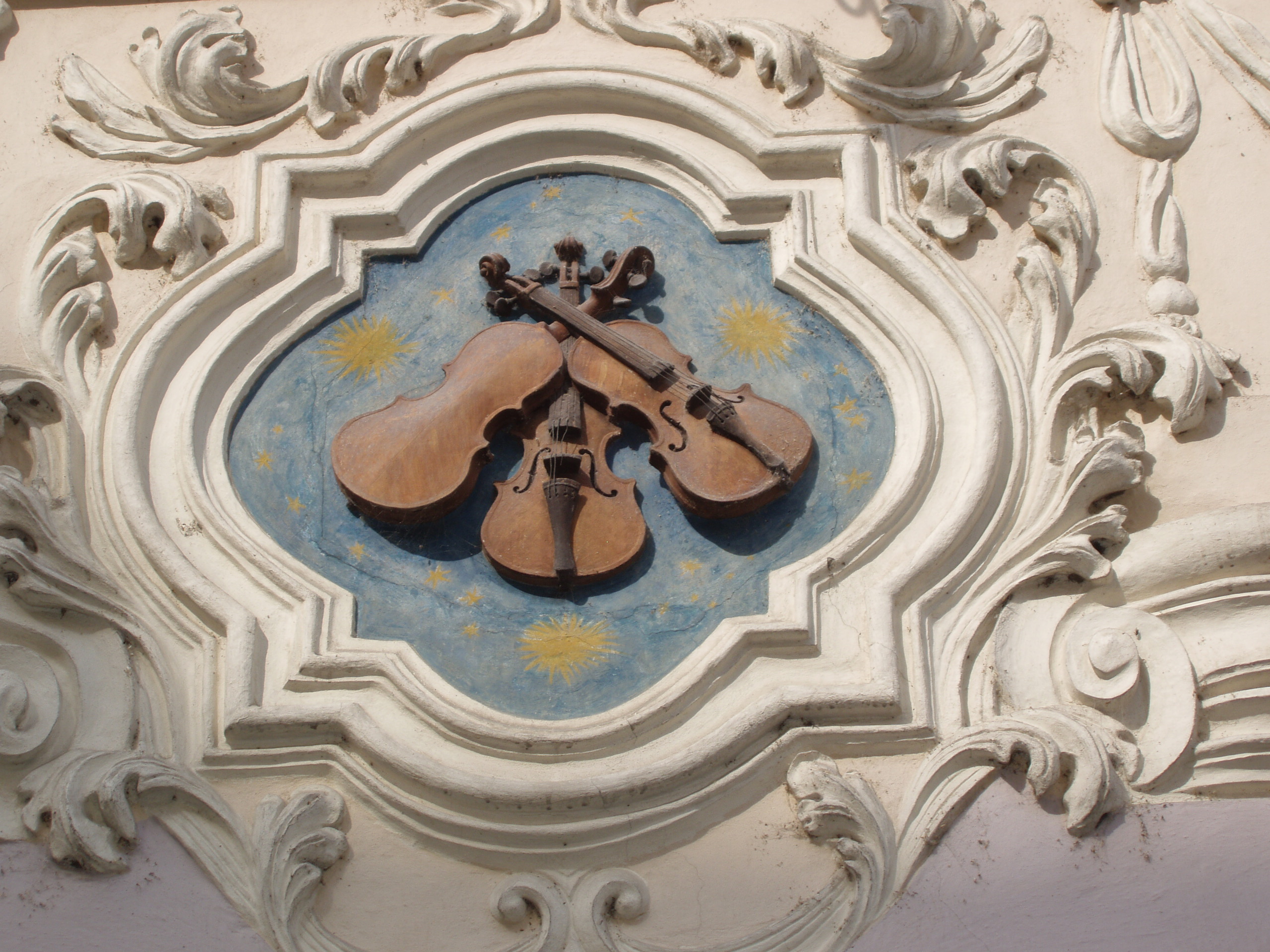 Nerudova 12; Three fiddels (U Tří housliček)